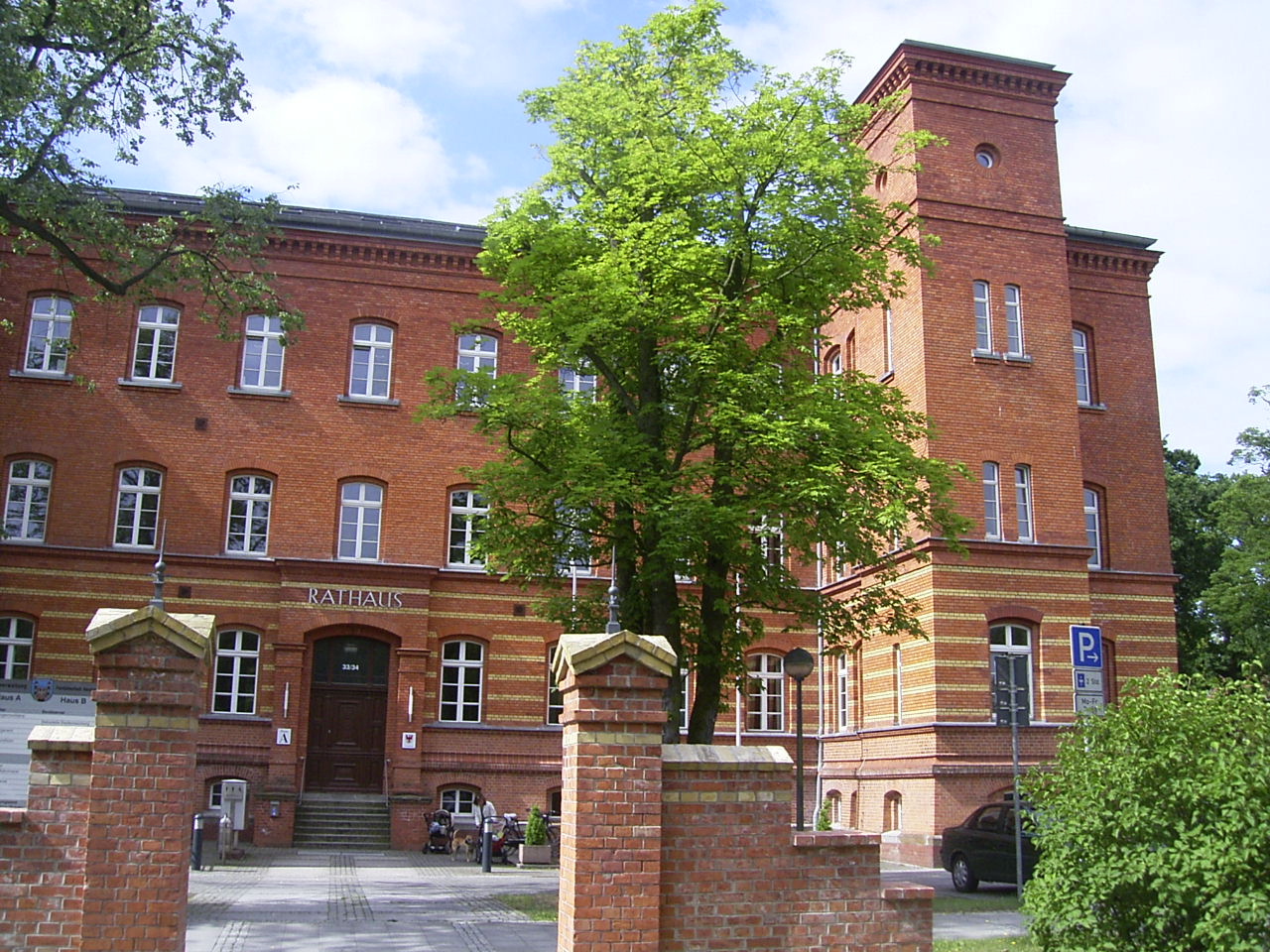 Das Rathaus in Neuruppin wurde ursprünglich als Garnisonslazarett errichtet.